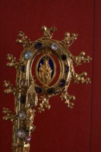 Bischofsstab, Johann Baptist Zwerger. Nachgebildet dem Äbtissinenstab Nonnberg, Salzburg